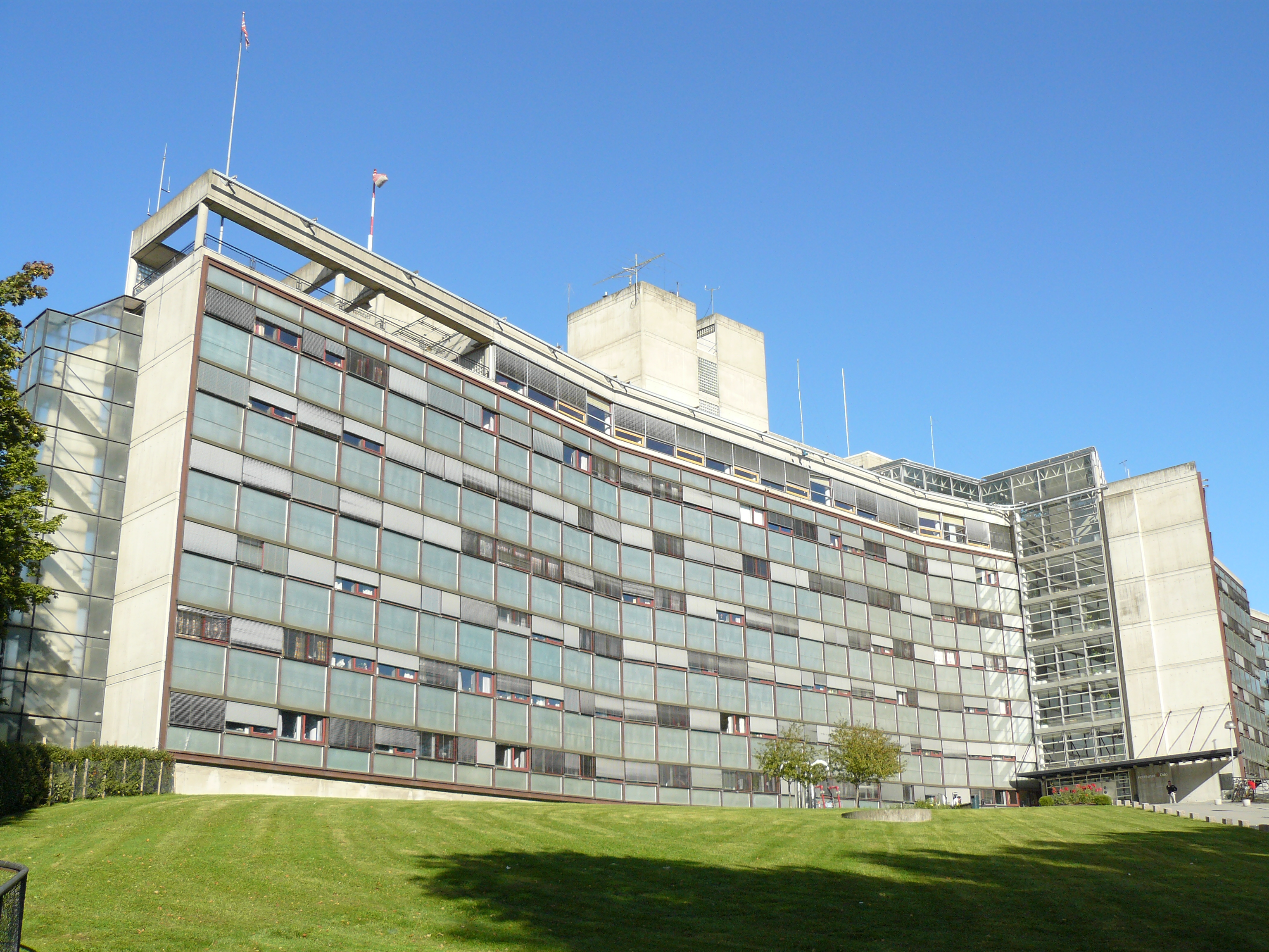 Politihuset, Oslo